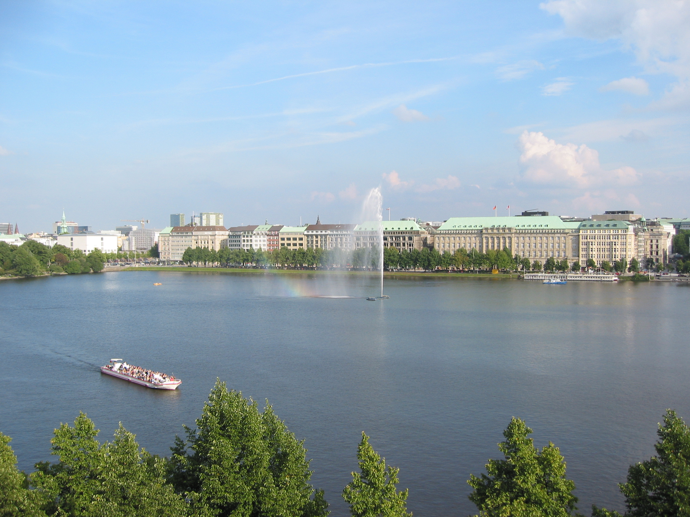 Hamburg Binnenalster mit Blick auf den Ballindamm und das HAPAG-Lloyd-Haus als dessen beherreschendes Bauwerk.